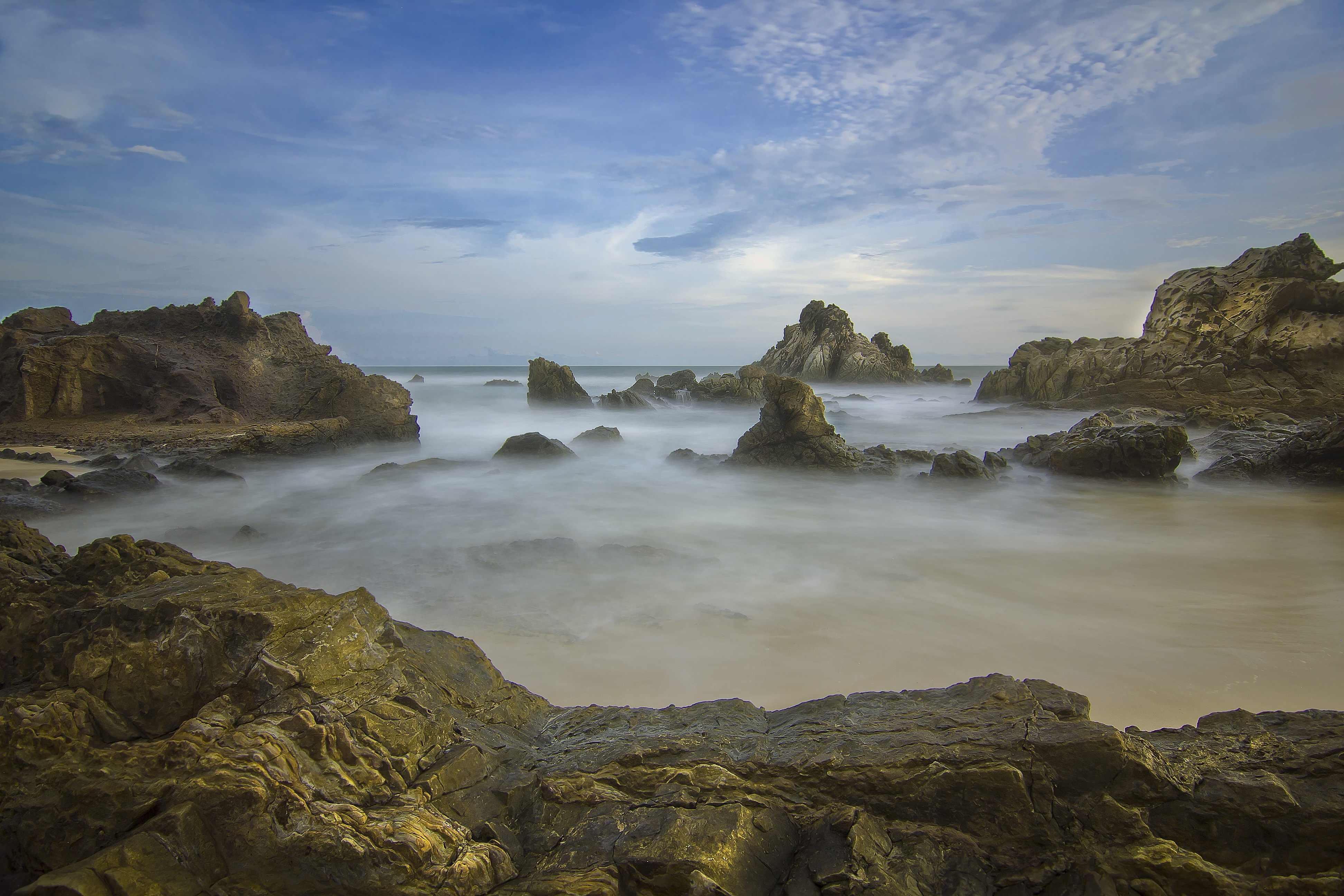 Juno Tetsuya - Pantai sekitaran daerah malimping mengahdirkan pantai dengan bebatuan yang bersusun dan besar, menjadi salah satu keindahan alam tersembunyi di daerah banten, indonesia